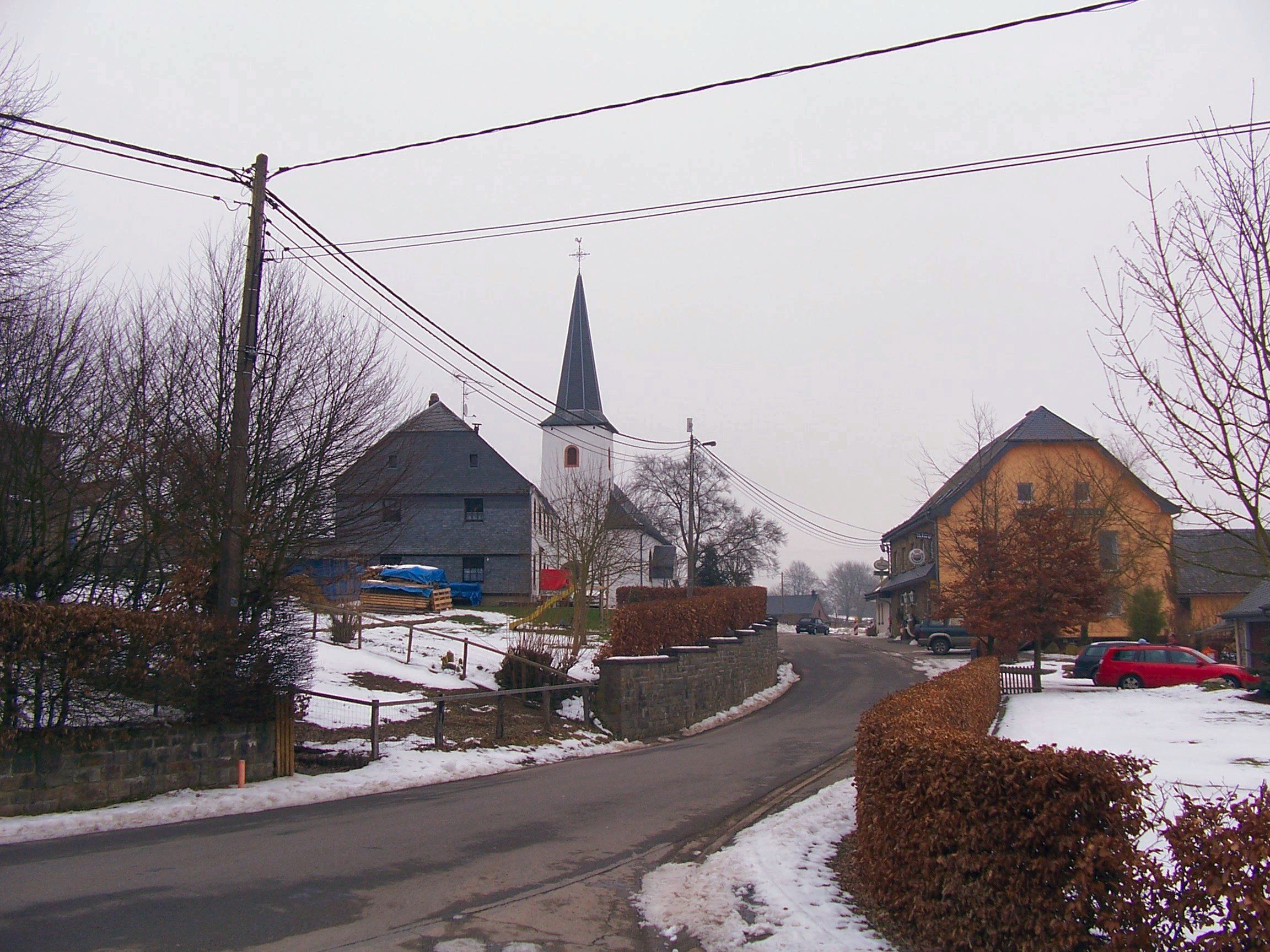 Het centrum van Herresbach.